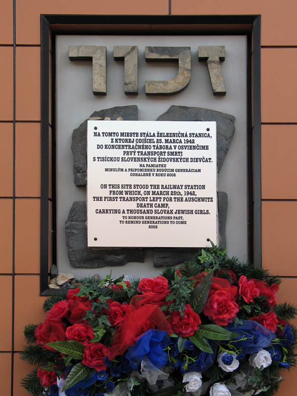 Pamätná tabuľa na železničnej stanici v Poprade